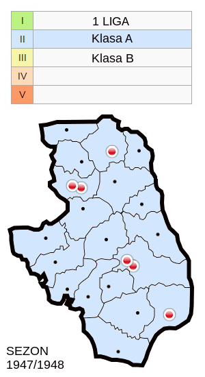 Jagiellonia w sezonie 1947/1948 - mapa klubów